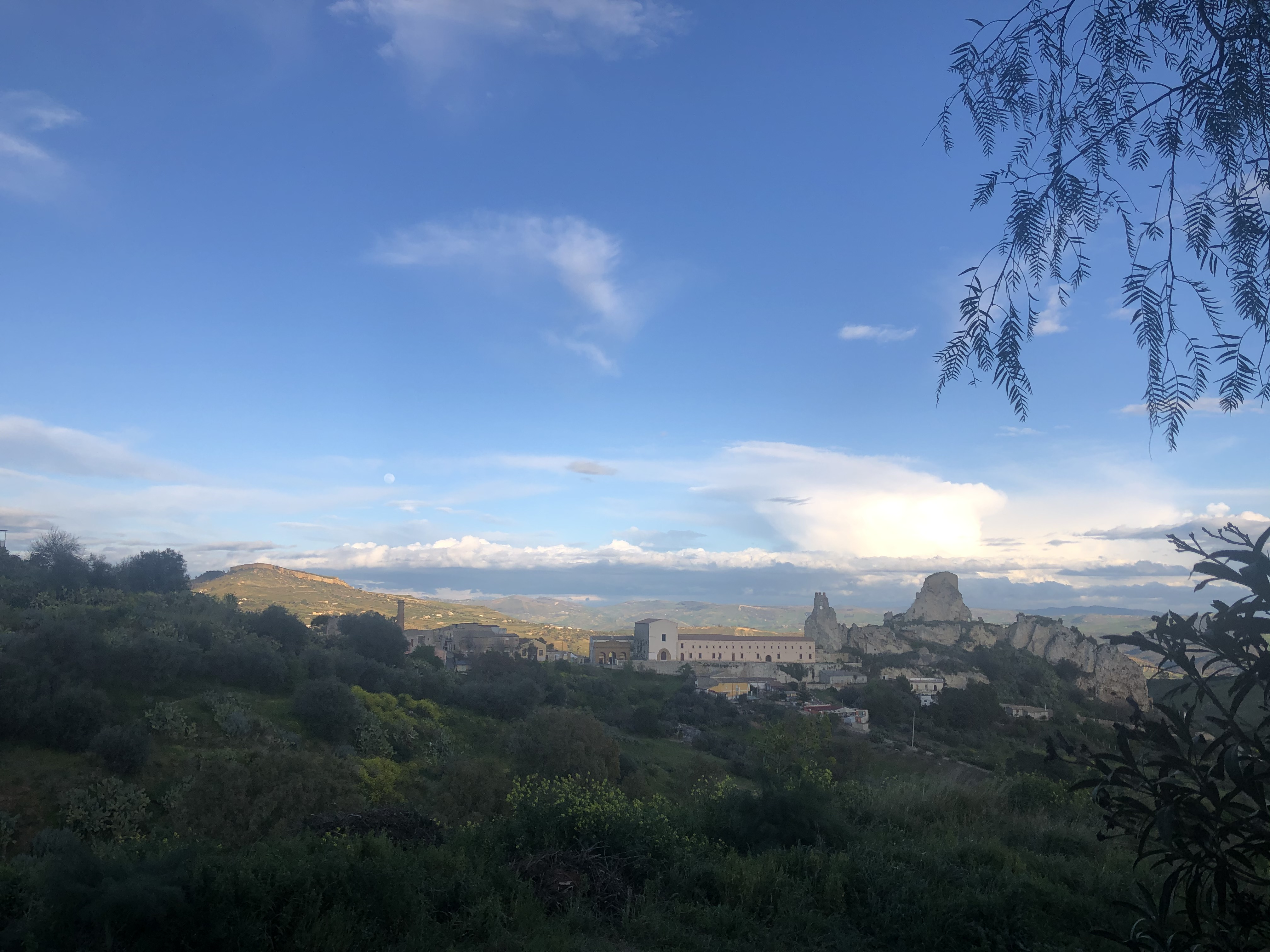 Panorama di Santa Maria La Vetere e del Castello di Pietrarossa a CL